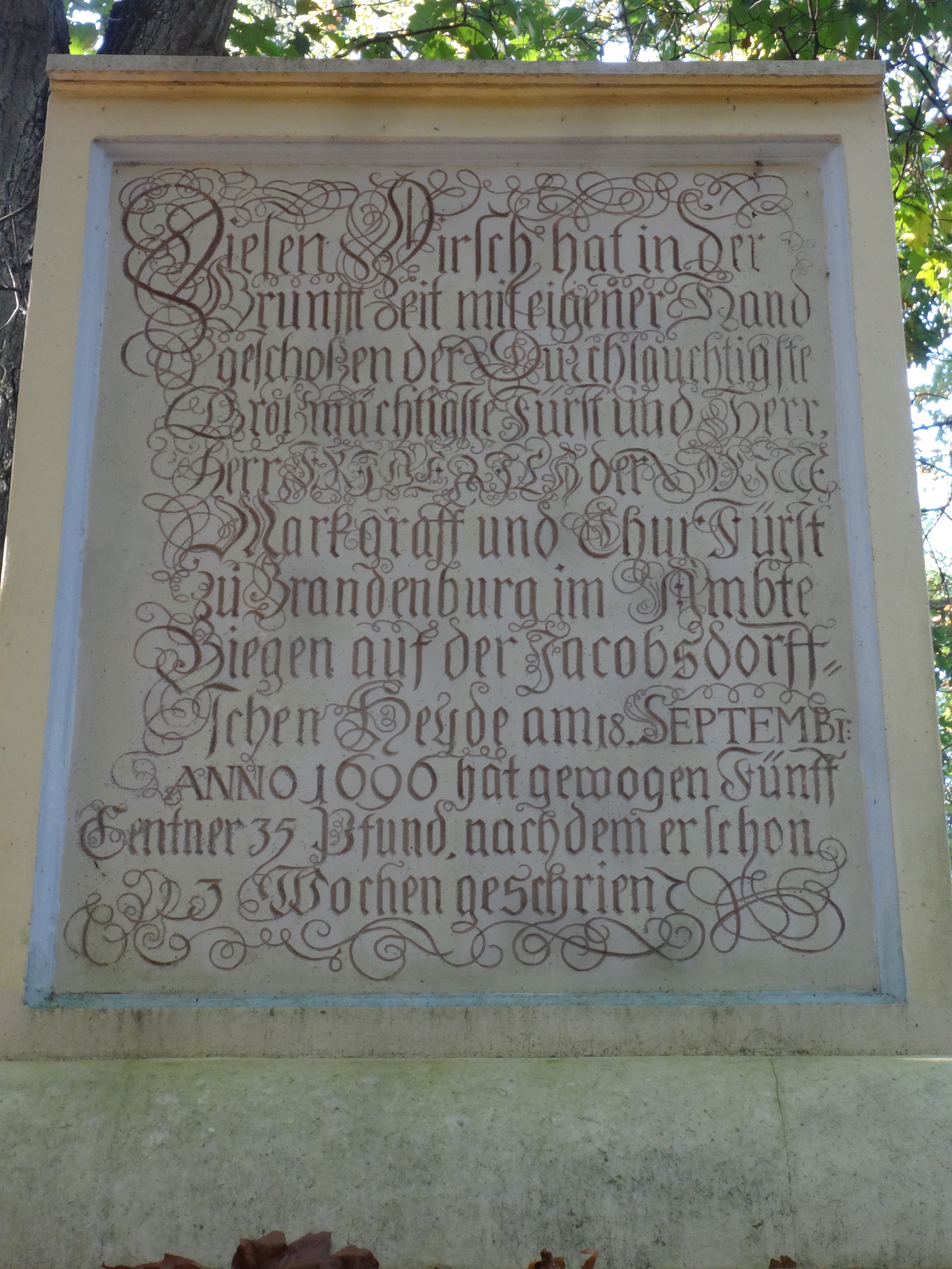 Das Hirsch-Denkmal erinnert an den Abschuss eines 66-Enders durch Friedrich I. von Preußen am 18. September 1696. Es steht an einer Verbindungsstraße, die von Briesen (Mark) im Landkreis Oder-Spree nach Kersdorf führt.